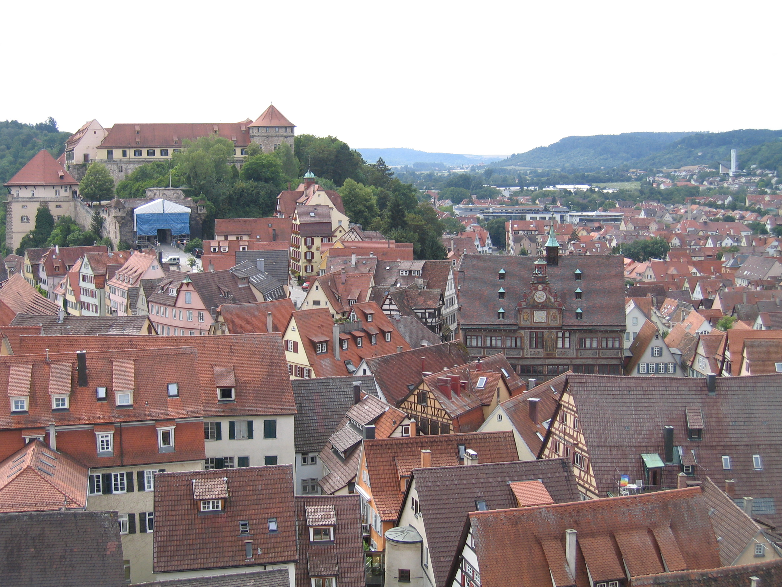 Sicht von der Stiftskirche.